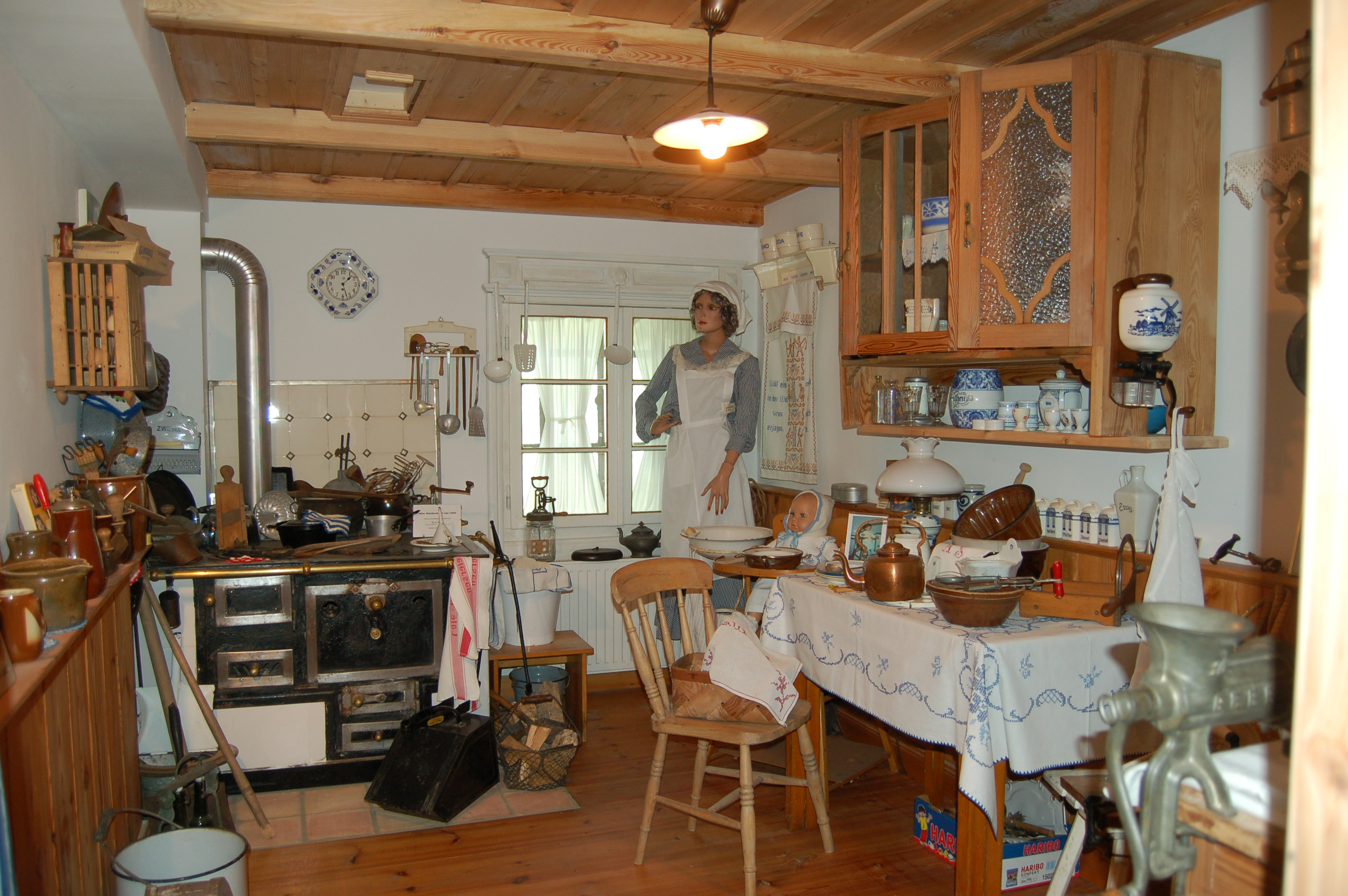 Stadt und Heimatgeschichtliches Museum Uetersen - Historische Küche mit Küchenherd von 1896